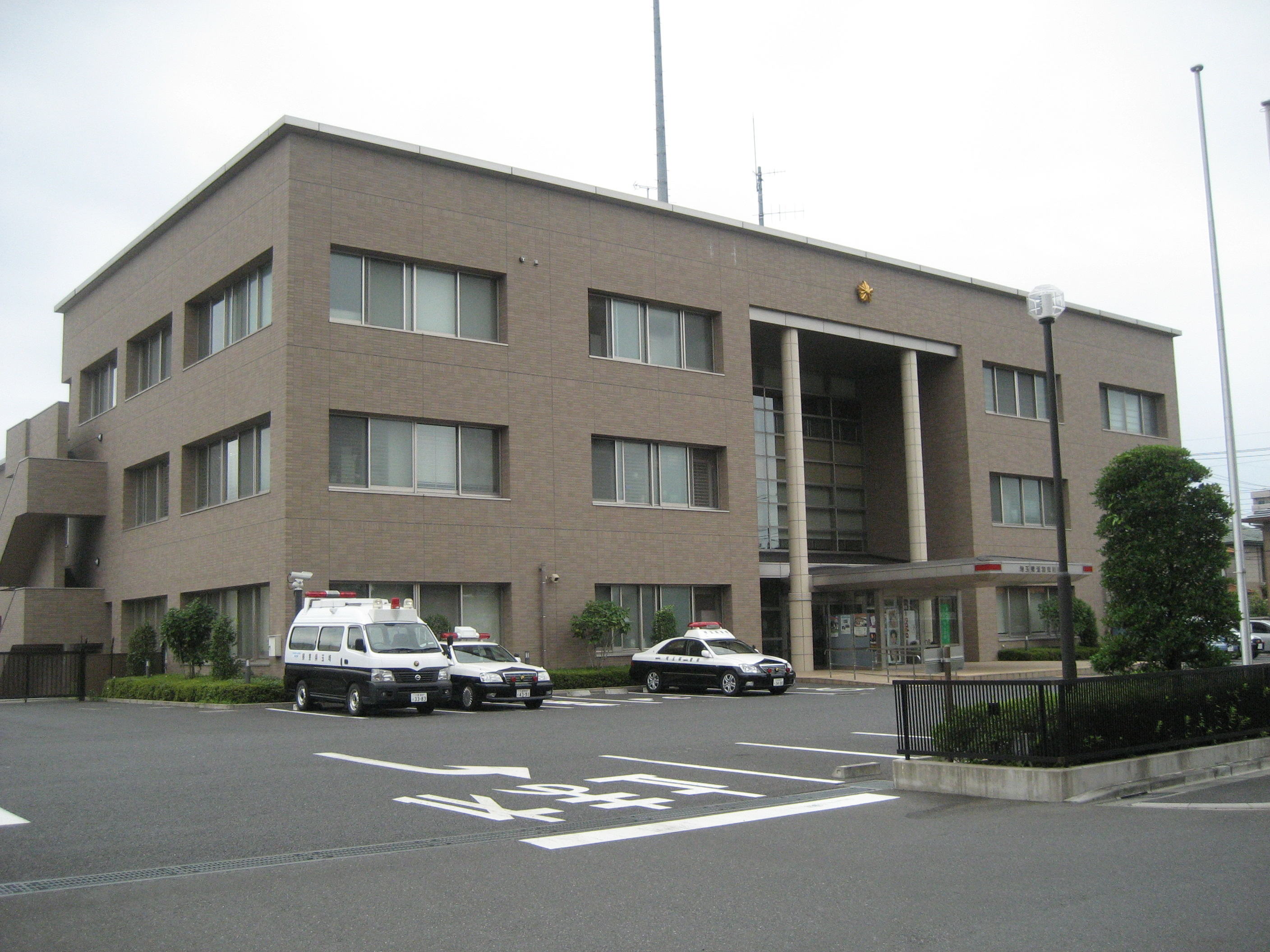 浦和東警察署庁舎